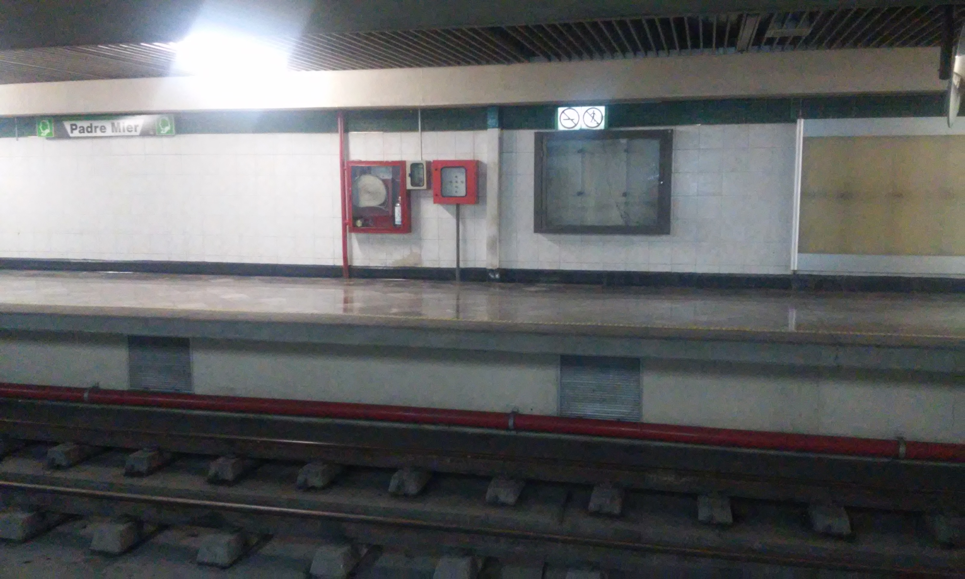 Estación Padre Mier